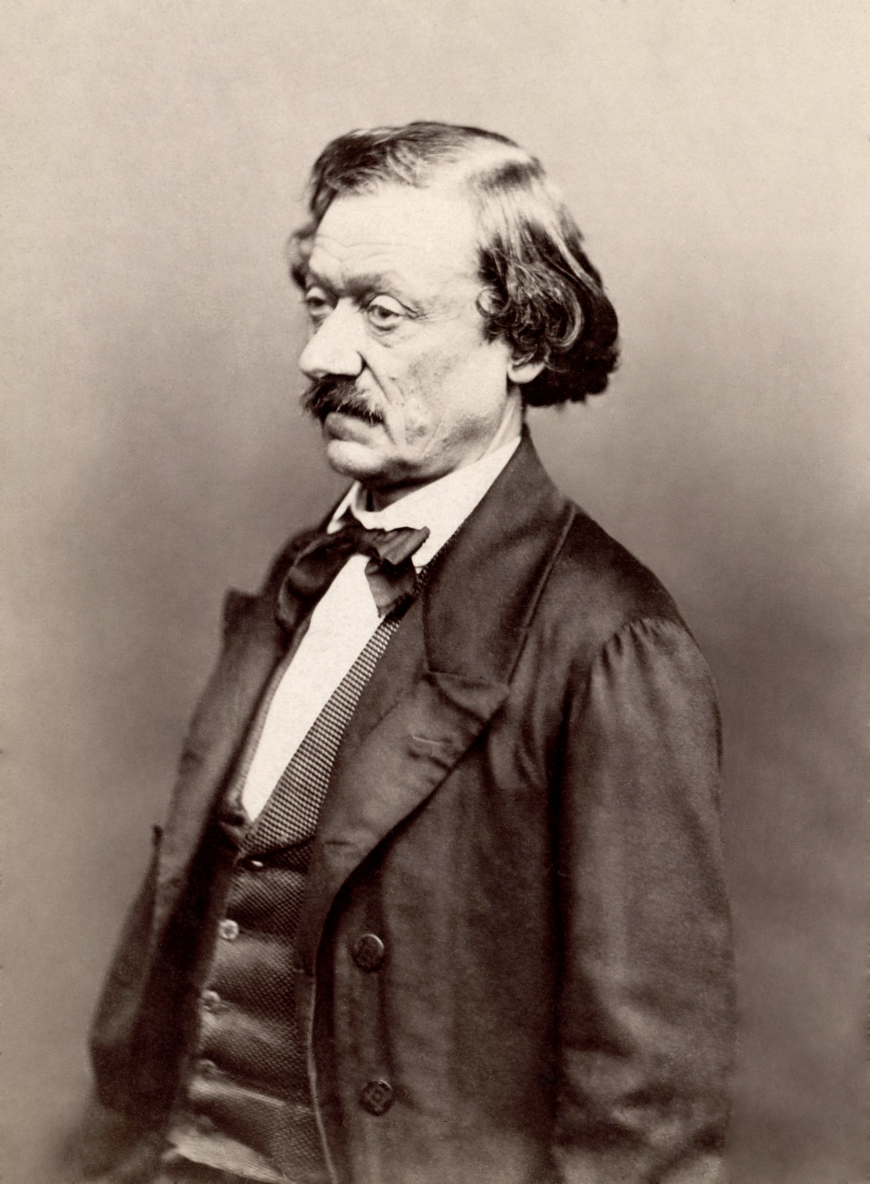 Antony Deschamps (1800 - 1869), poète français.